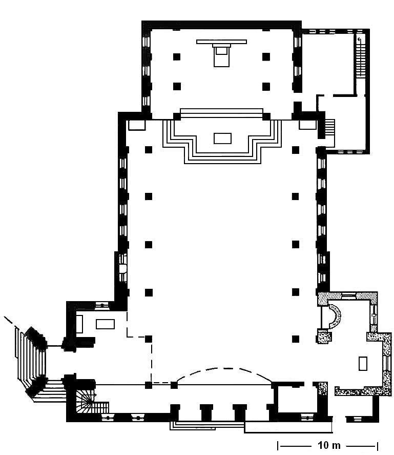 Grundriss der Pfarrkirche St. Mauritius Kärlich in Mülheim-Kärlich